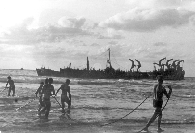 קבוצת עובדים מחיל הים על חוף תל אביב במסגרת פינוי שבר האלטלנה